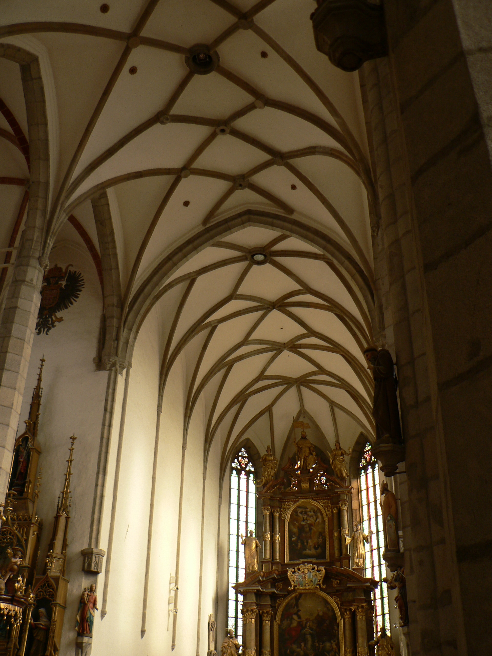 Kostel svatého Víta (Český Krumlov)